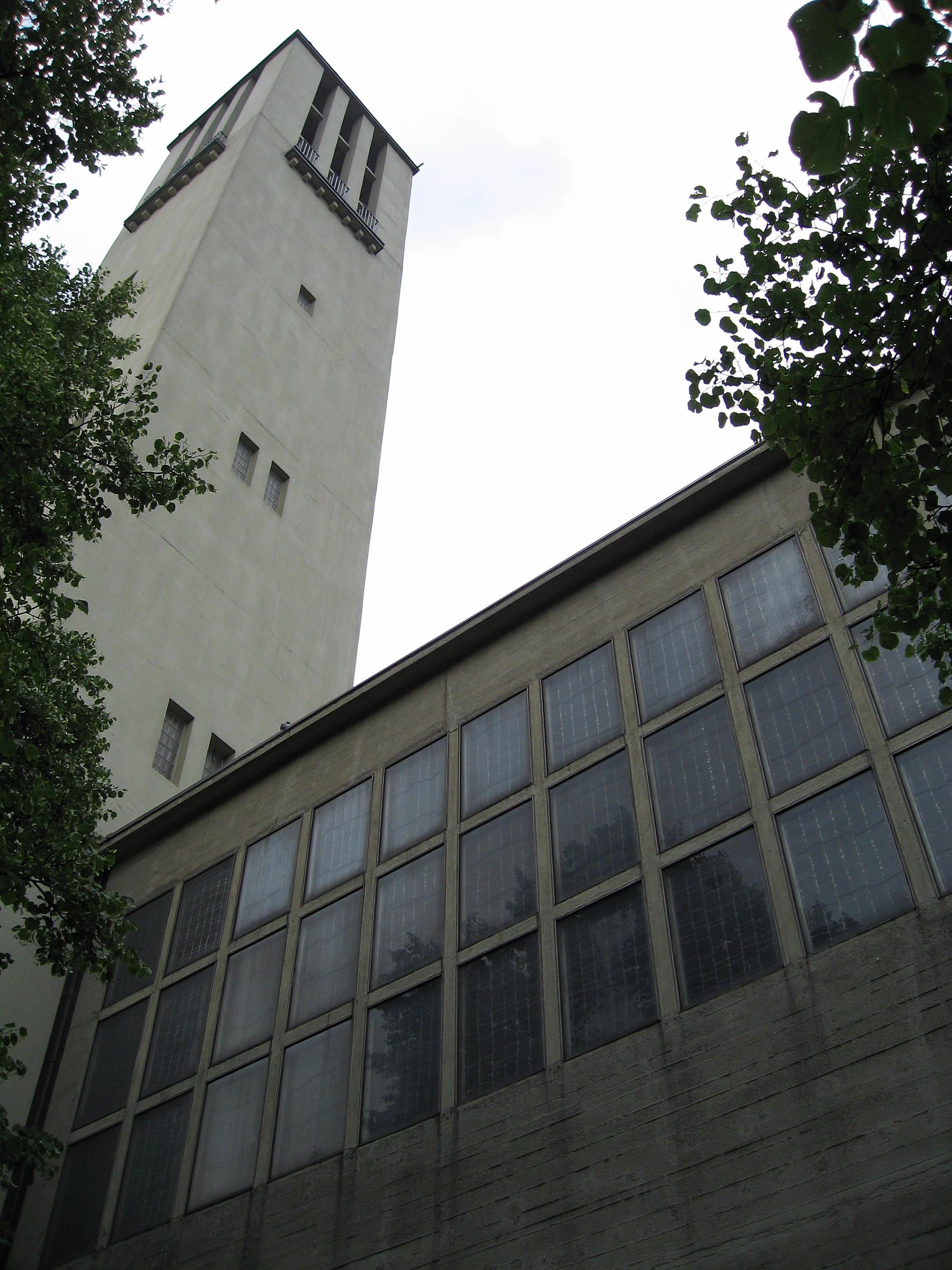 Dortmund Kreuzviertel Nicolaikirche